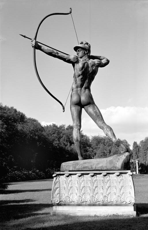 Potsdam.- Sanssouci, Grüner Bogenschütze